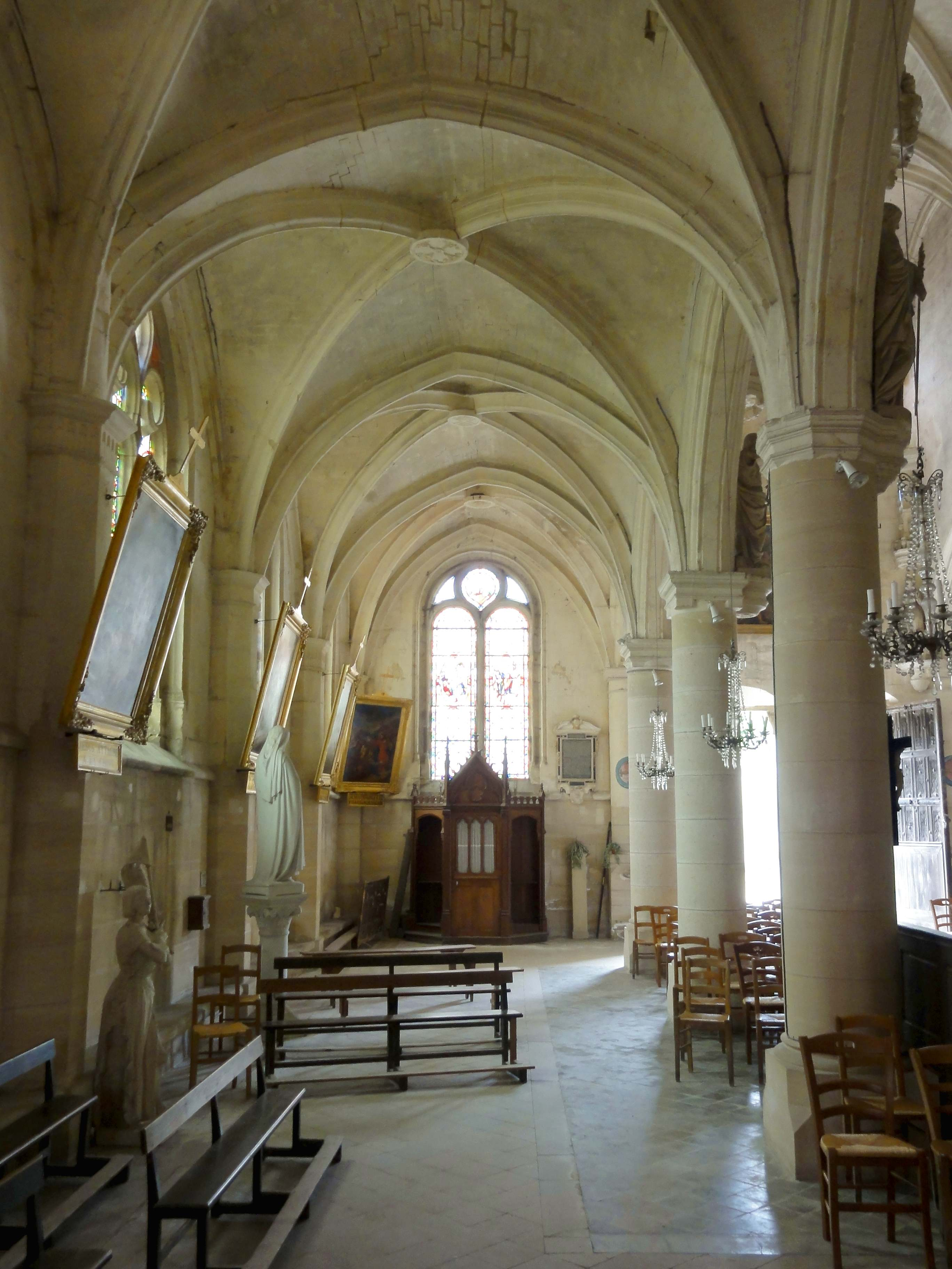 Intérieur de l'église (voir titre).